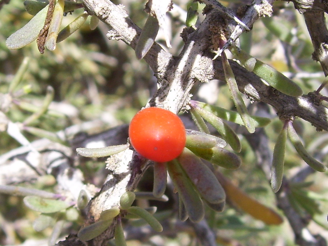 Lycium intricatum con fruto maduro